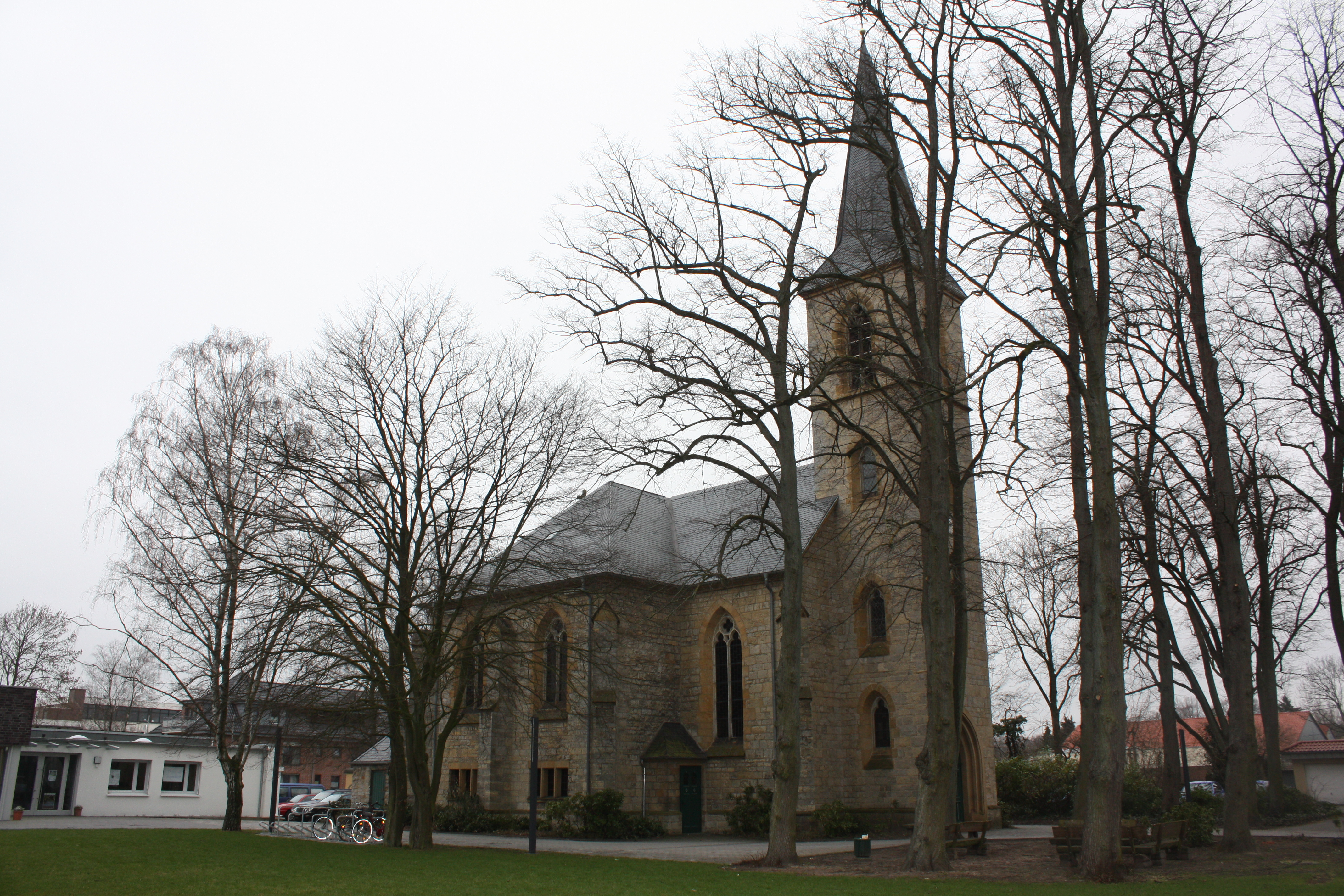 evangelische Johanneskirche Friedrichsdorf, Gütersloh This is the photograph of an architectural monument. It is part of the list of cultural monuments of Gütersloh, no. A034